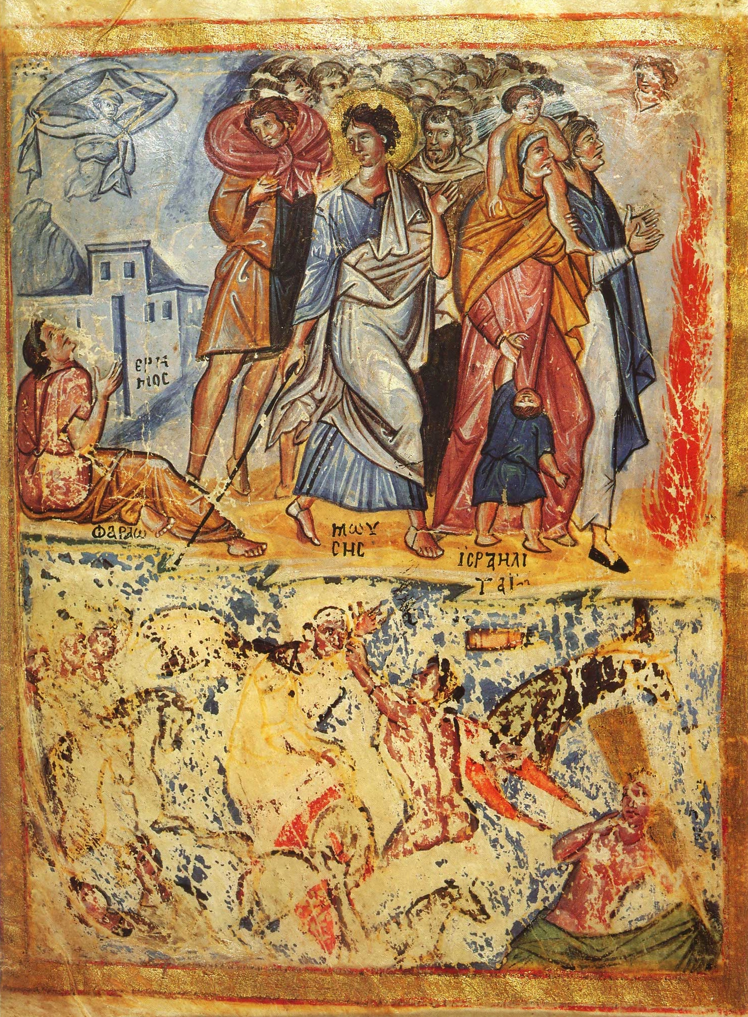 Псалтирь, Российская Национальная Библиотека - Санкт-Петербург, греч. 269 (ранее в cod. Sinait. 38), л. 2 Миниатюра: Переход через Красное море. Потопление войск фараона